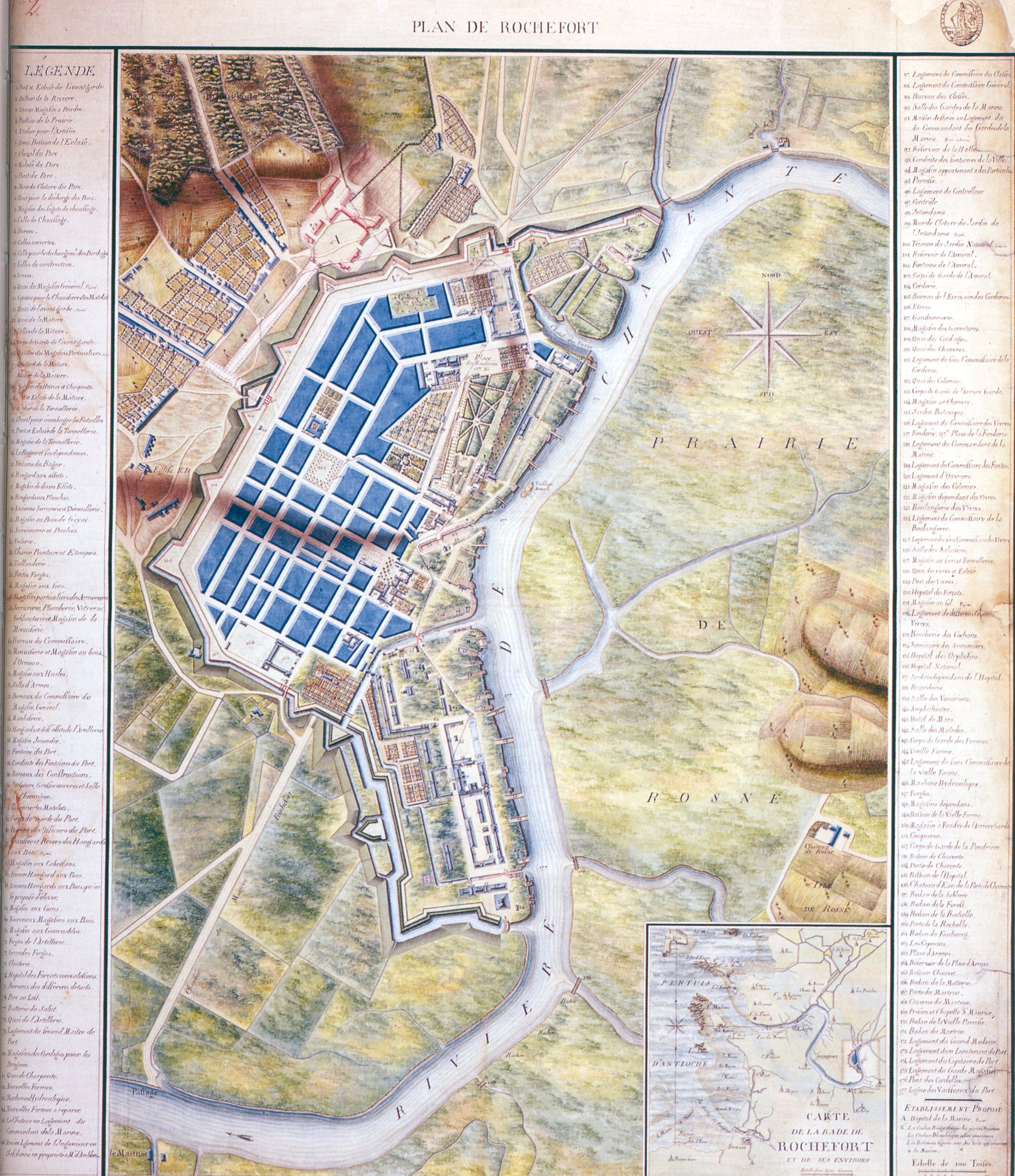 Plan de l'arsenal et de la ville royale de Rochefort aux VIIe siècle. L'original se trouve aux archives de la Marine à Vincennes (Service historique des armées).